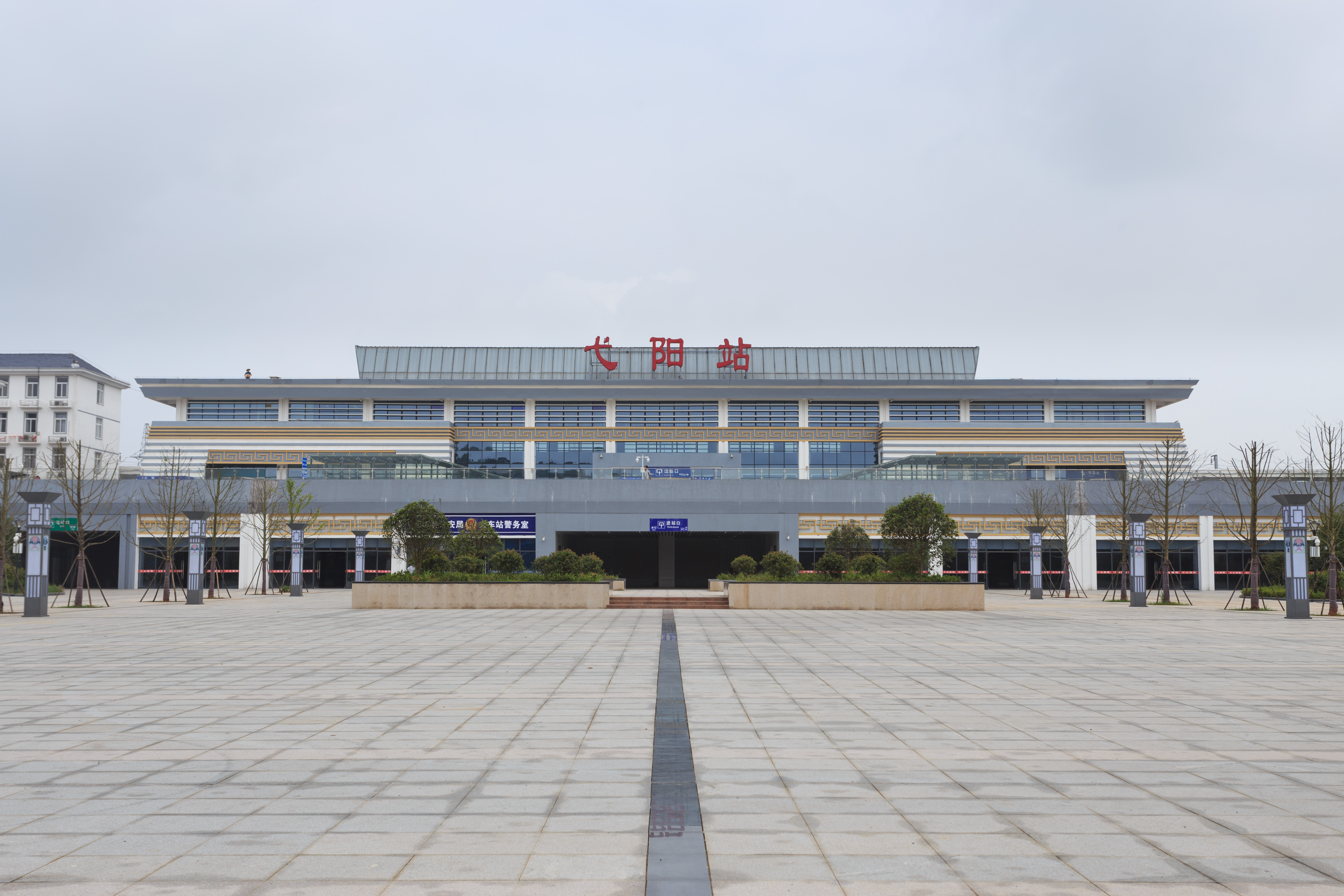 弋阳站